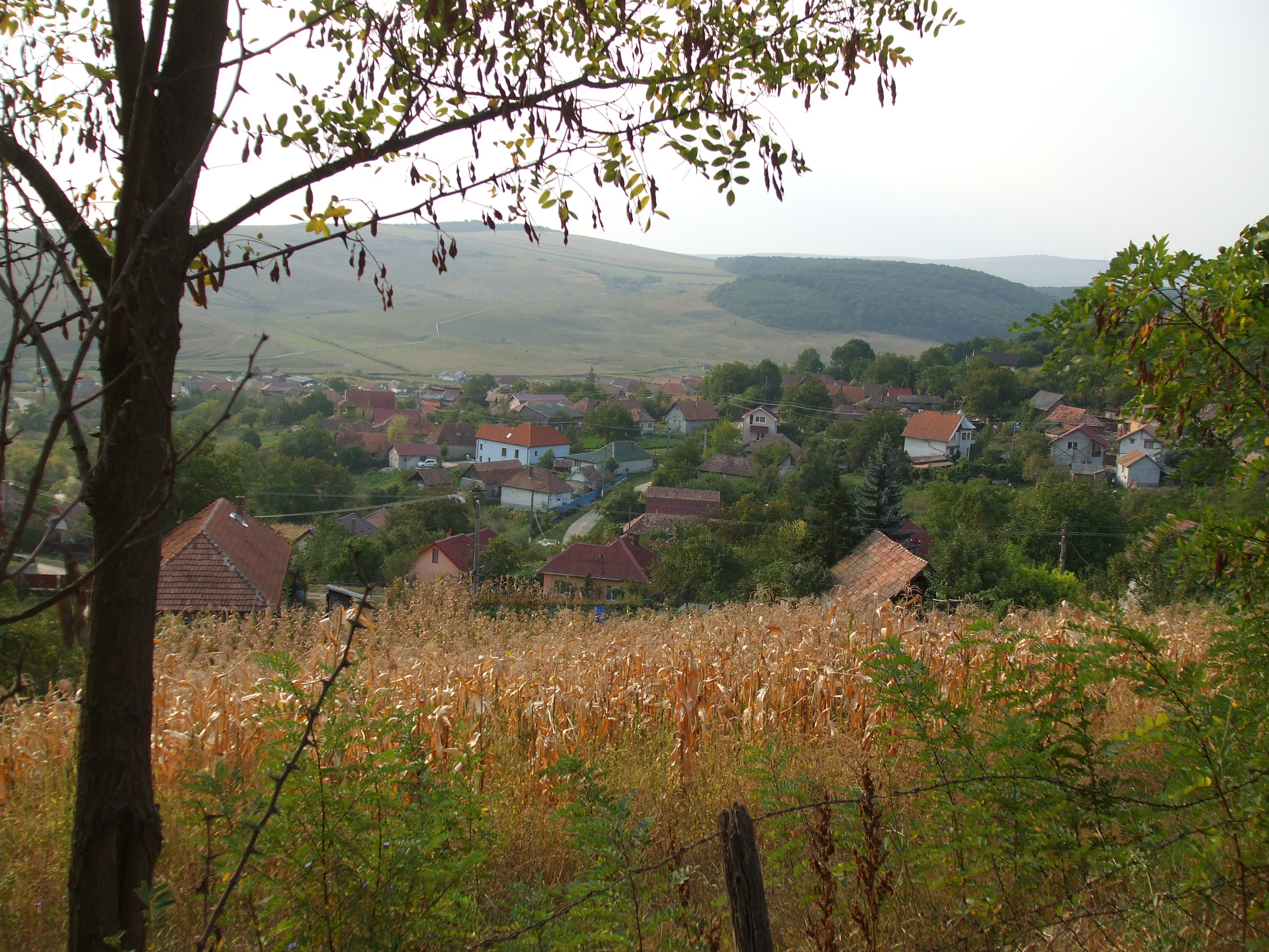 Satul Dezmir,comuna Apahida ,jud.Cluj